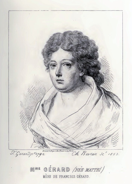 Portrait de Claire Mattéi, mère de François Gérard, soeur de François Xavier Tortoni : portrait de F. Gérard, 1792, gravé par Ch. Barin,1853.